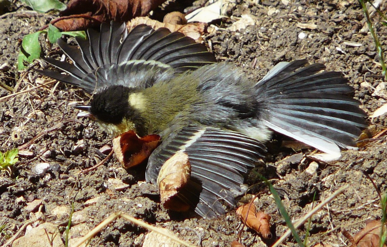 Jeune mésange charbonnière se séchant au soleil après un bain, Périgueux, Dordogne, France.